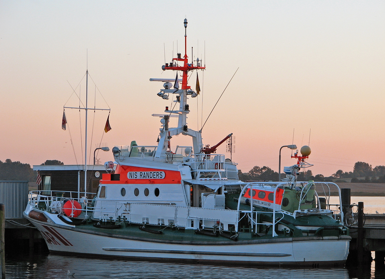 Beschreibung: Seenotkreuzer Nis Randers angelegt in seinem Heimathafen Maasholm Fotograf: Darkone, 3. September 2005